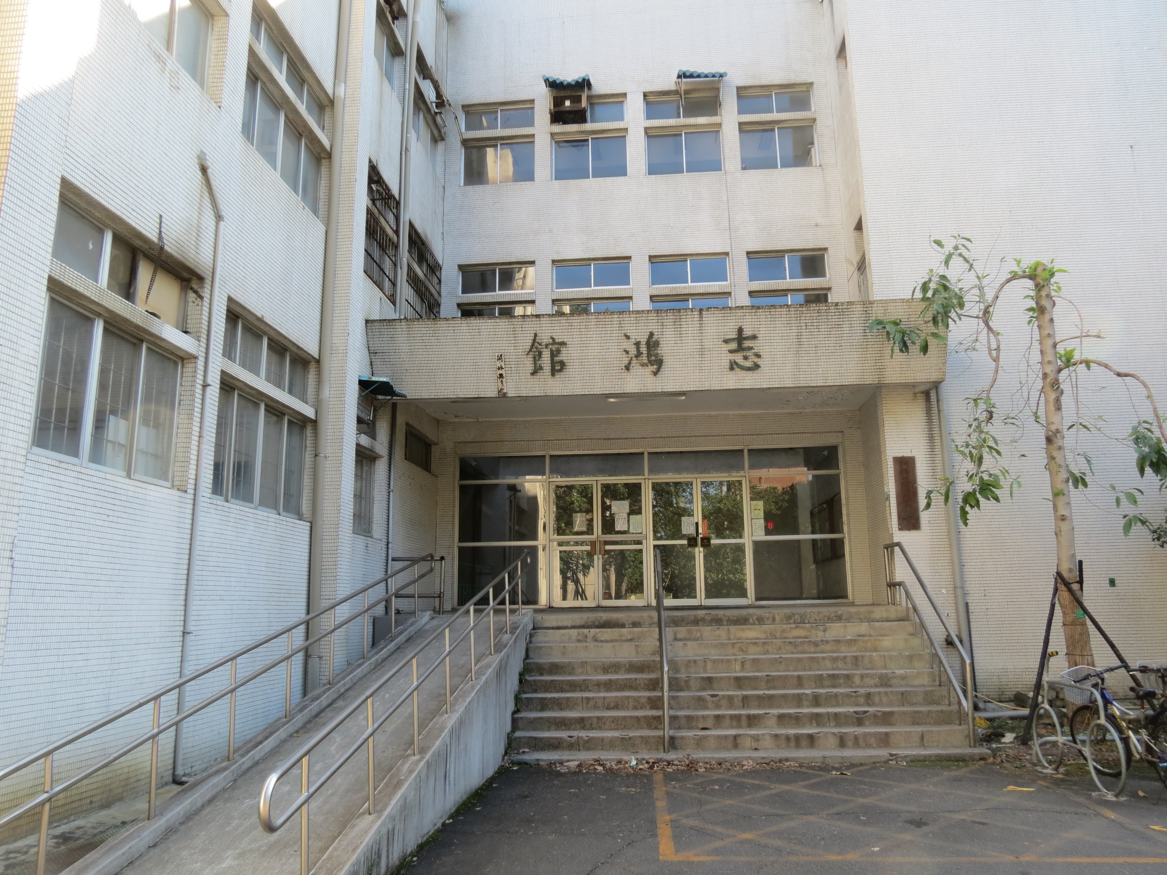 中文（台灣）: 志鴻館正門與正面